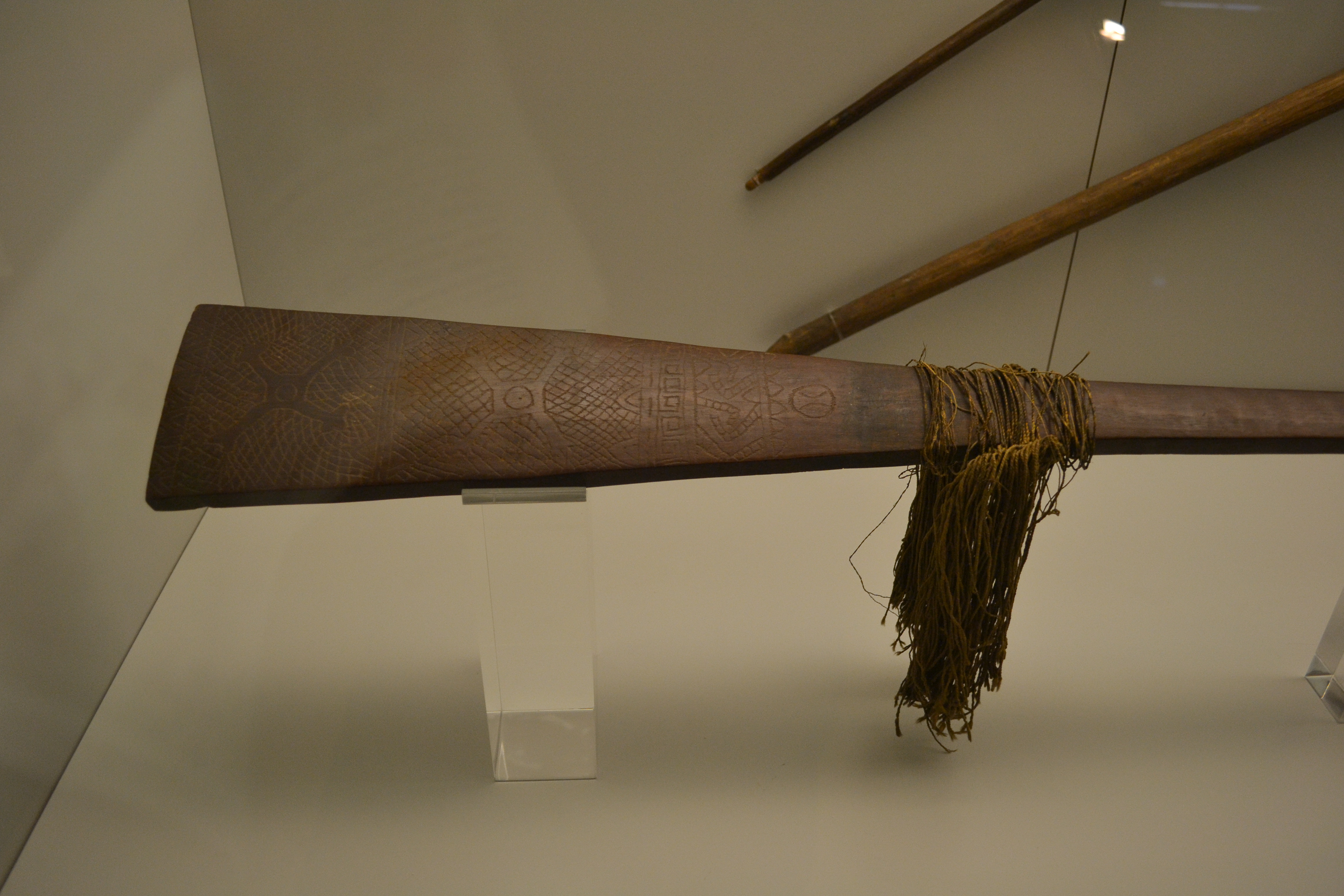 Macana del Amazonas. Material: Fibra vegetal y madera. Procedencia: Amazonas (Brasil). Longitud: 107 cm; anchura: 12,50 cm. Fleco: Longitud: 21 cm. Nº inv. 01657. Museo de América.